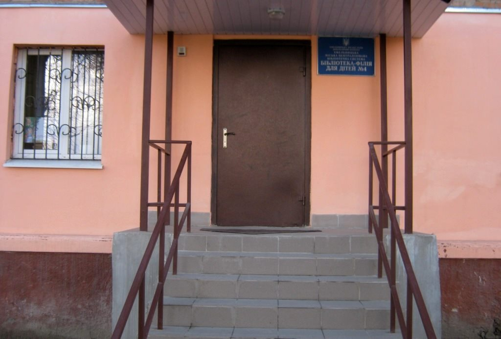 Дитяча публічна бібліотека